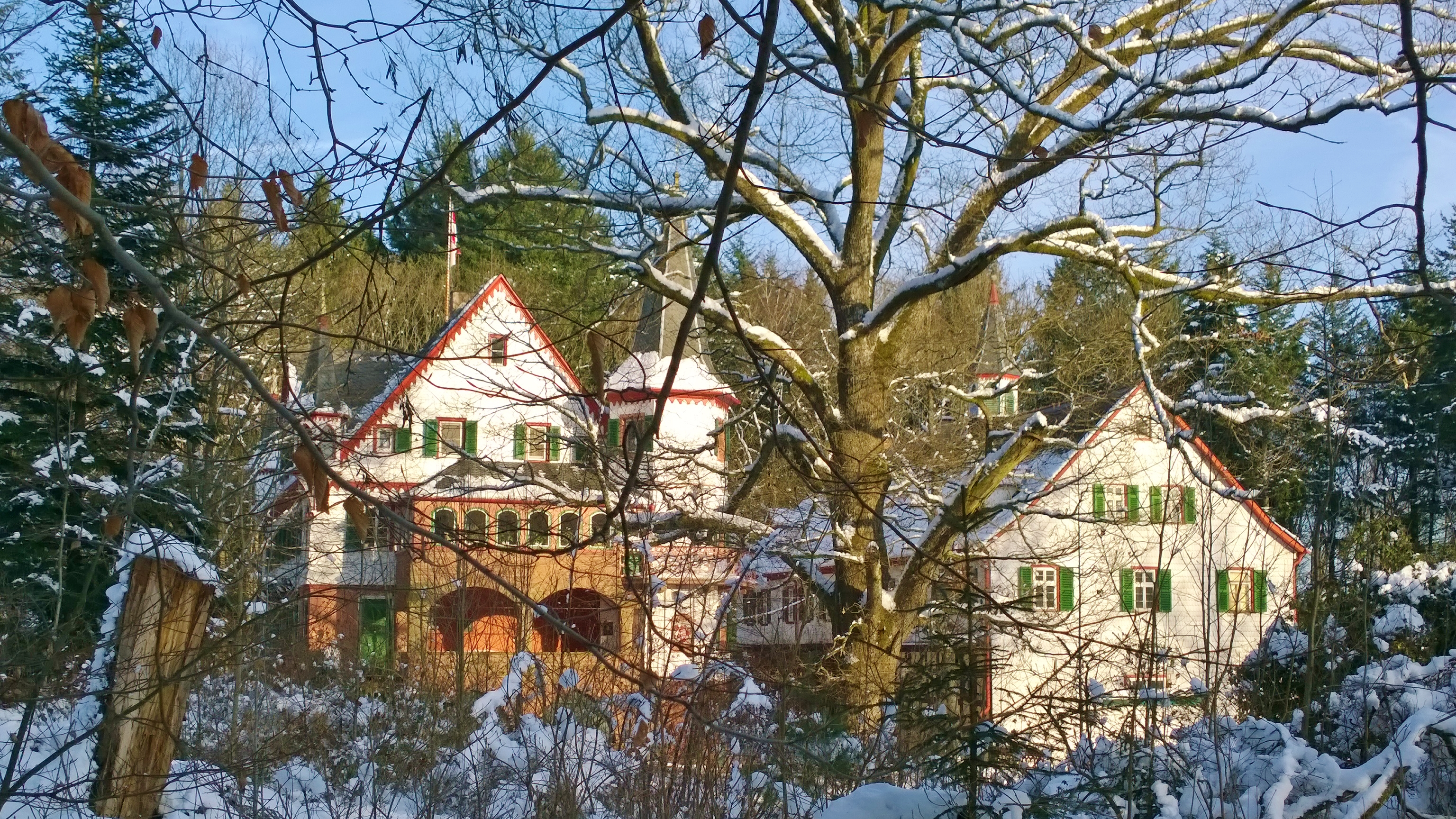 Blick von Süden; links der Gebäudeteil zur Straßenseite mit Treppenturm, rechts das Gebäude mit Glockentürmchen